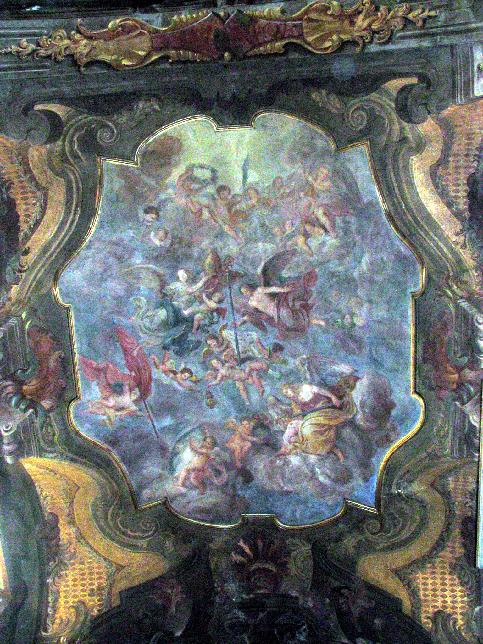 Asti, San Martino church, painting fresco, Gian Carlo Aliberti(XVII/XVIII sec)